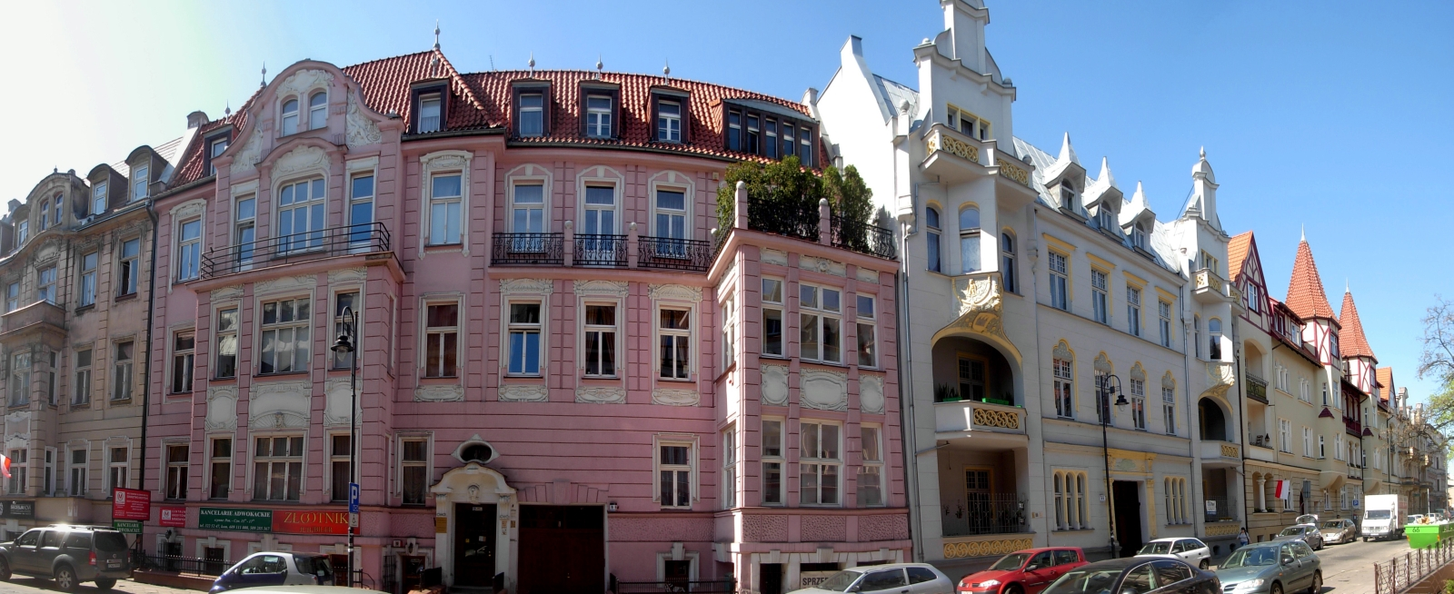 Ulica Augusta Cieszkowskiego (nr 7-15) w Bydgoszczy